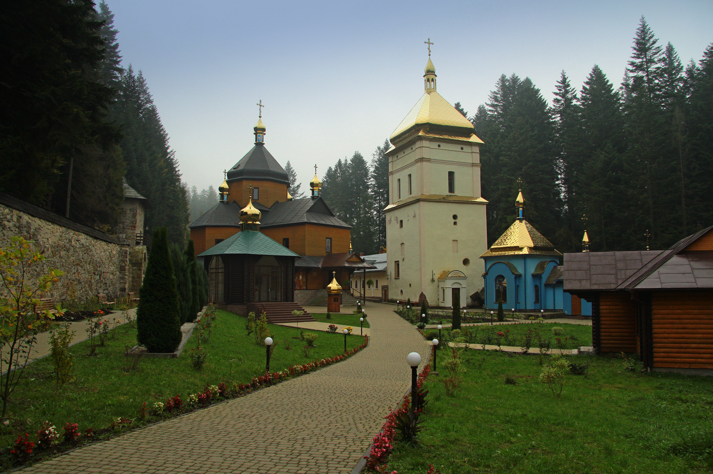 Монастир-скит (мур.):, с. Манява